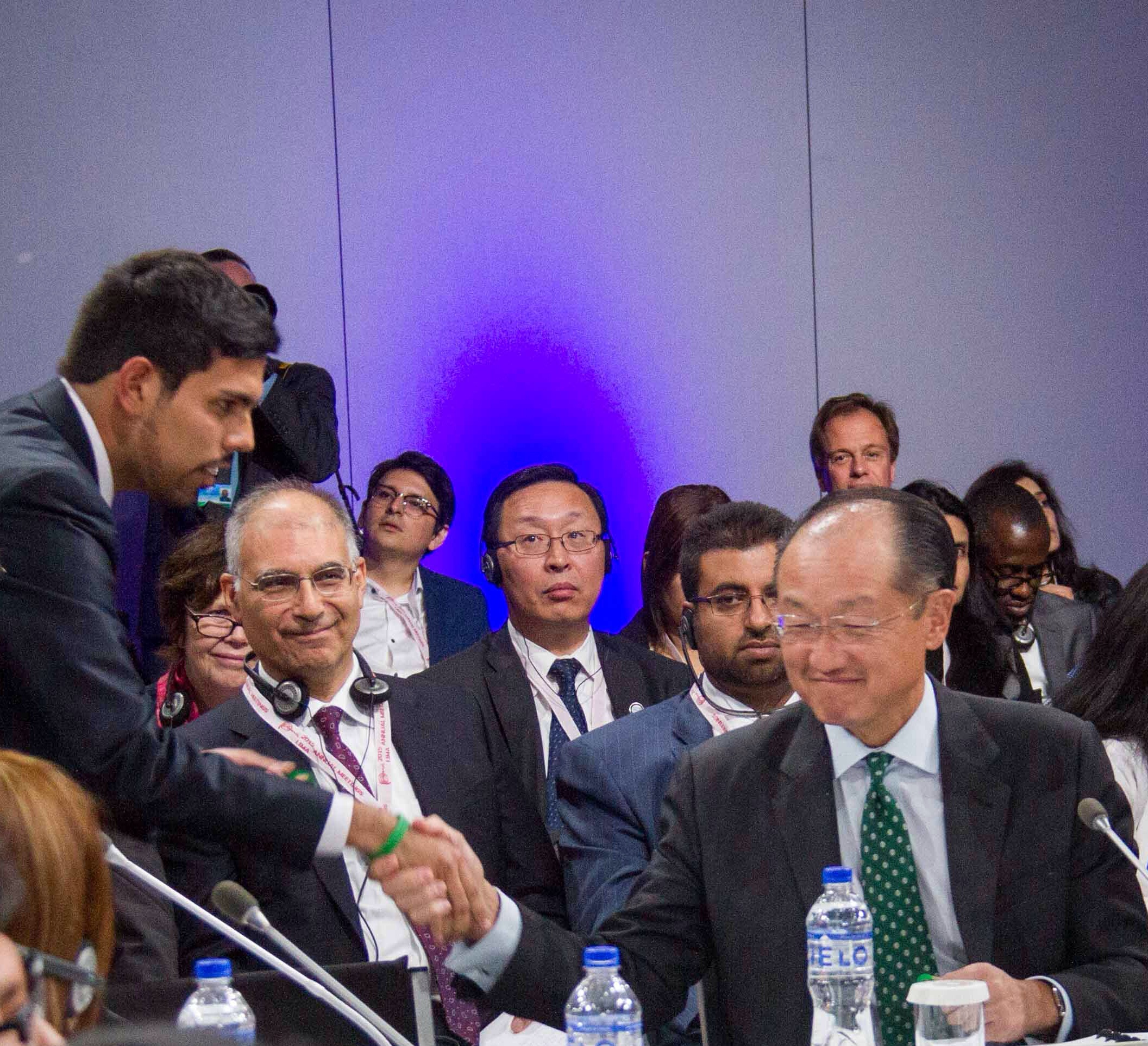 Carlo Angeles advocating for Youth Empowerment at World Bank - IMF Annual Meetings